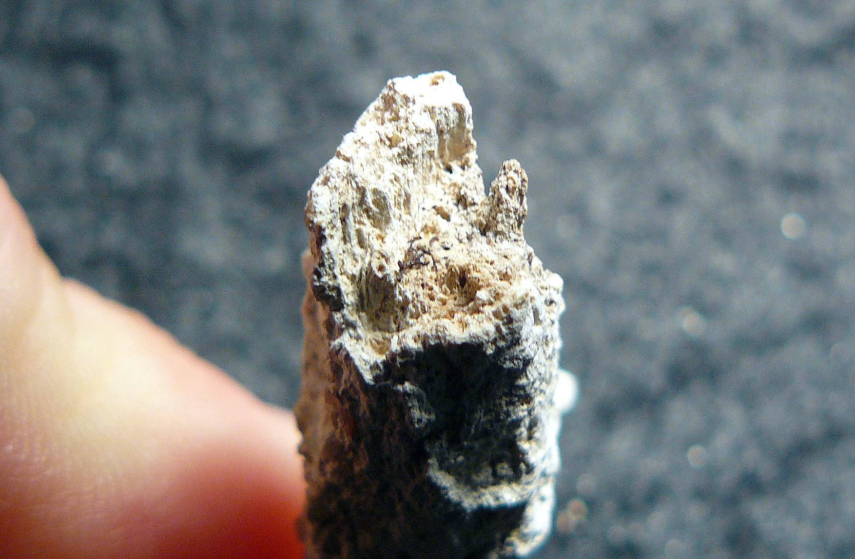 Osteokolle vom Dummersdorfer Ufer in Lübeck